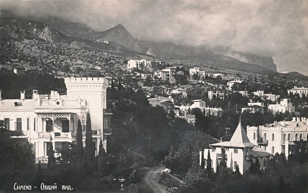 Вид Симеиза 1920-е